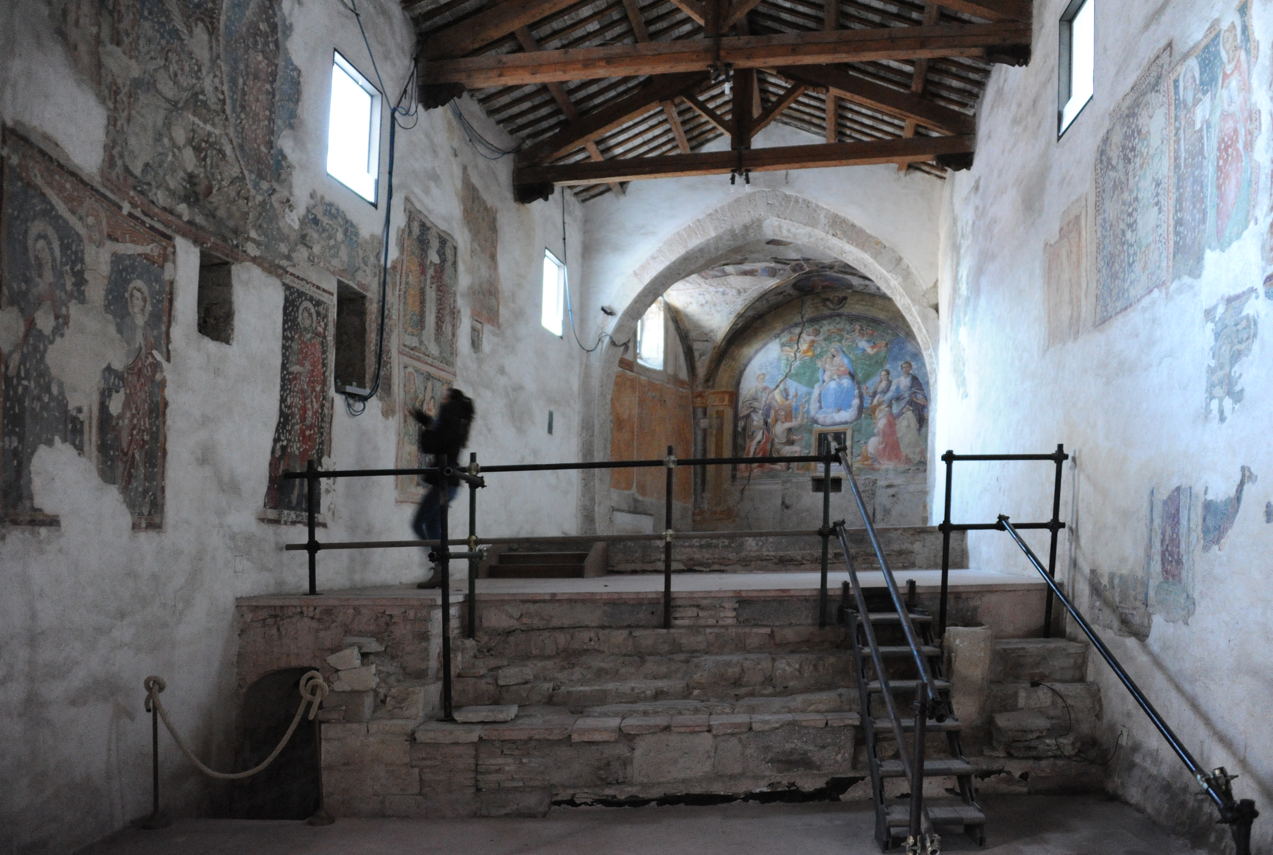 Vista dell'interno